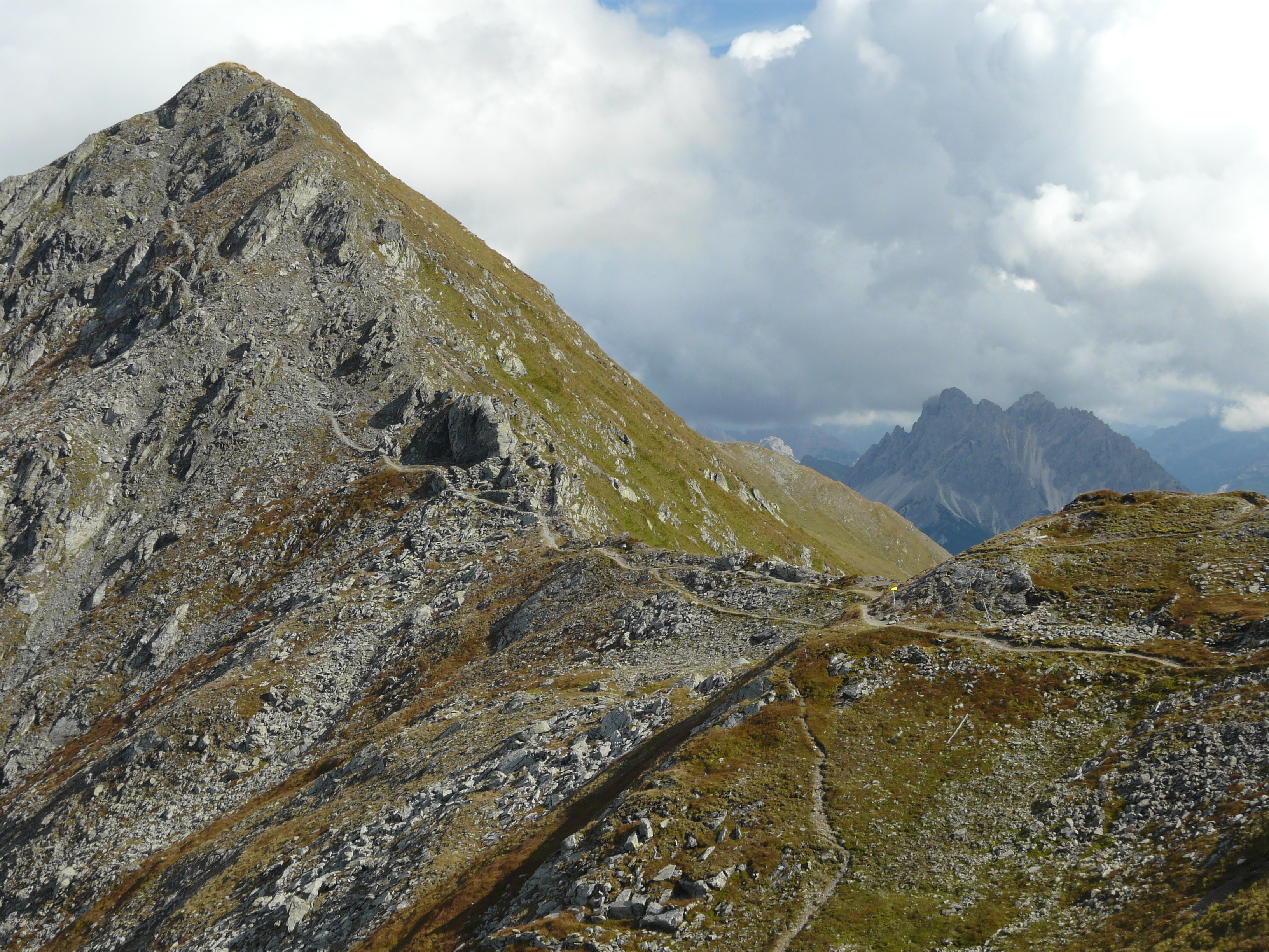 Auf dem Karnischen Höhenweg, zwischen der Sillianer Hütte und der Obstanserseehütte.